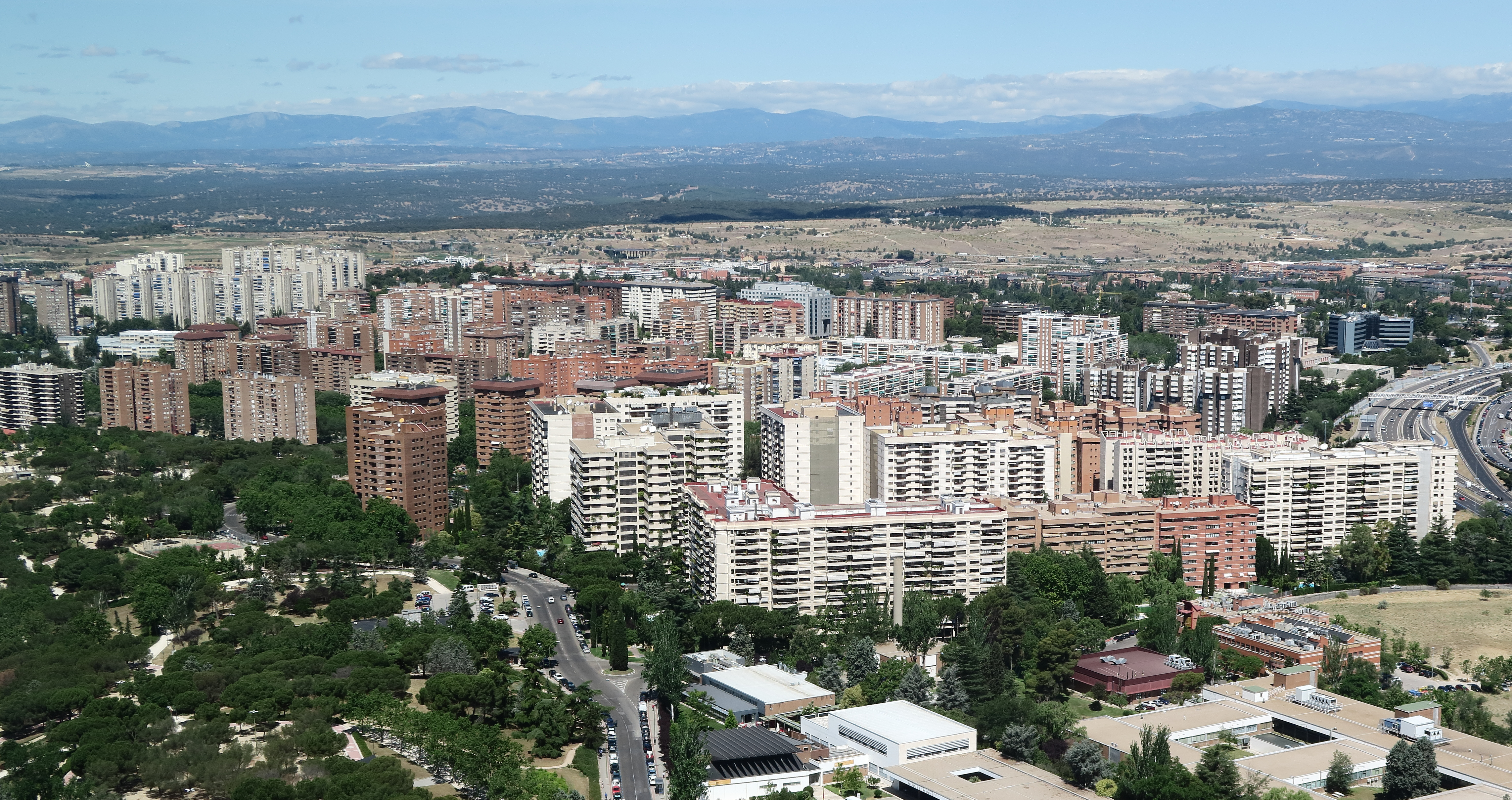 Barrio El Pilar, Madrid, desde la Torre Espacio